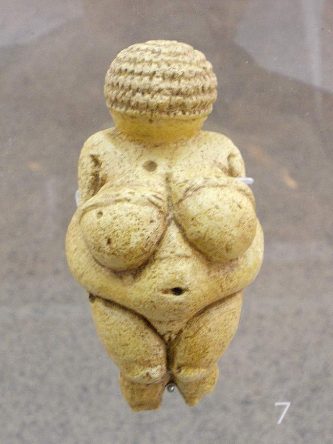 Burgos - Museo de la Evolución Humana (MEH)